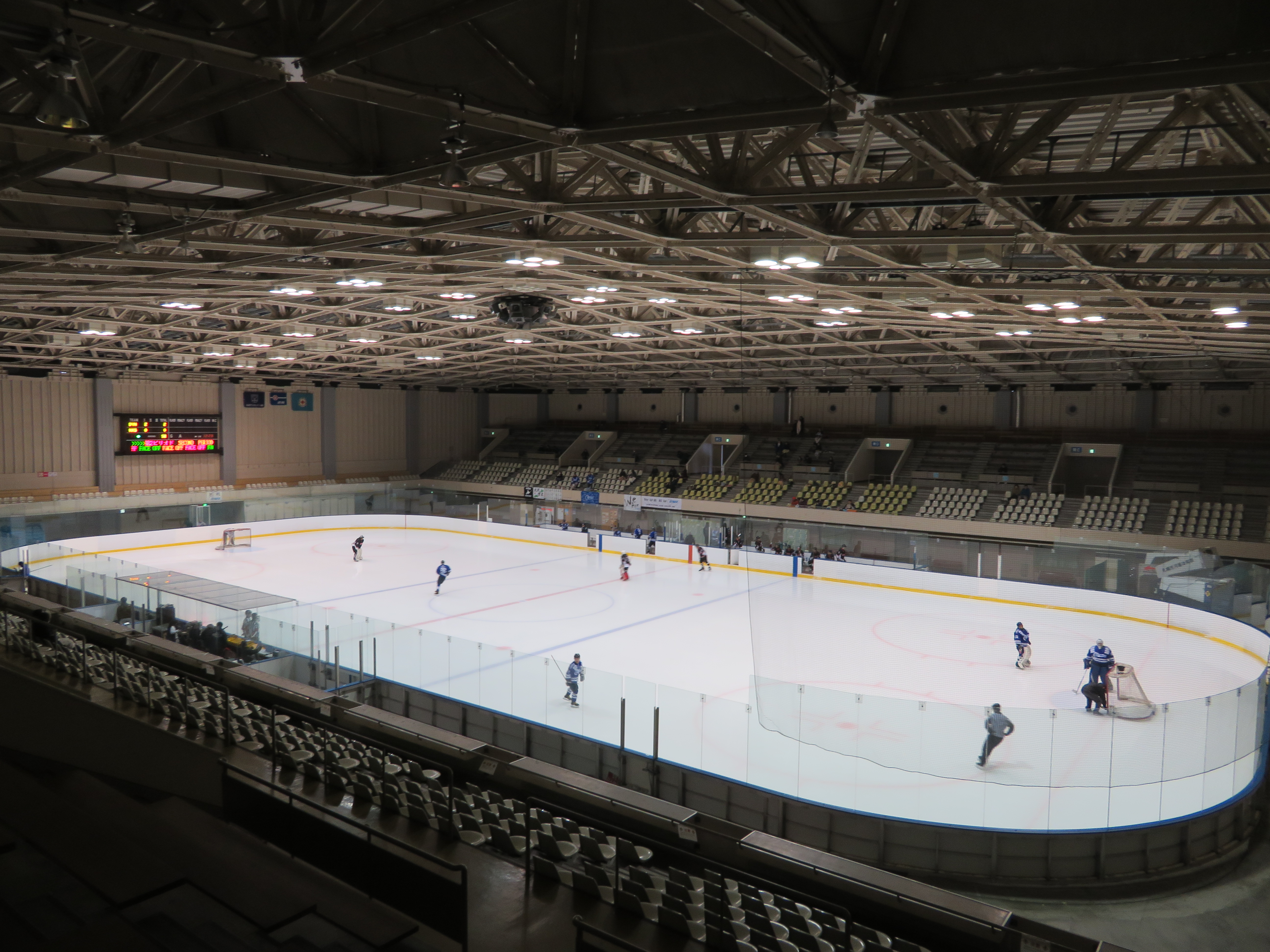 札幌市月寒体育館